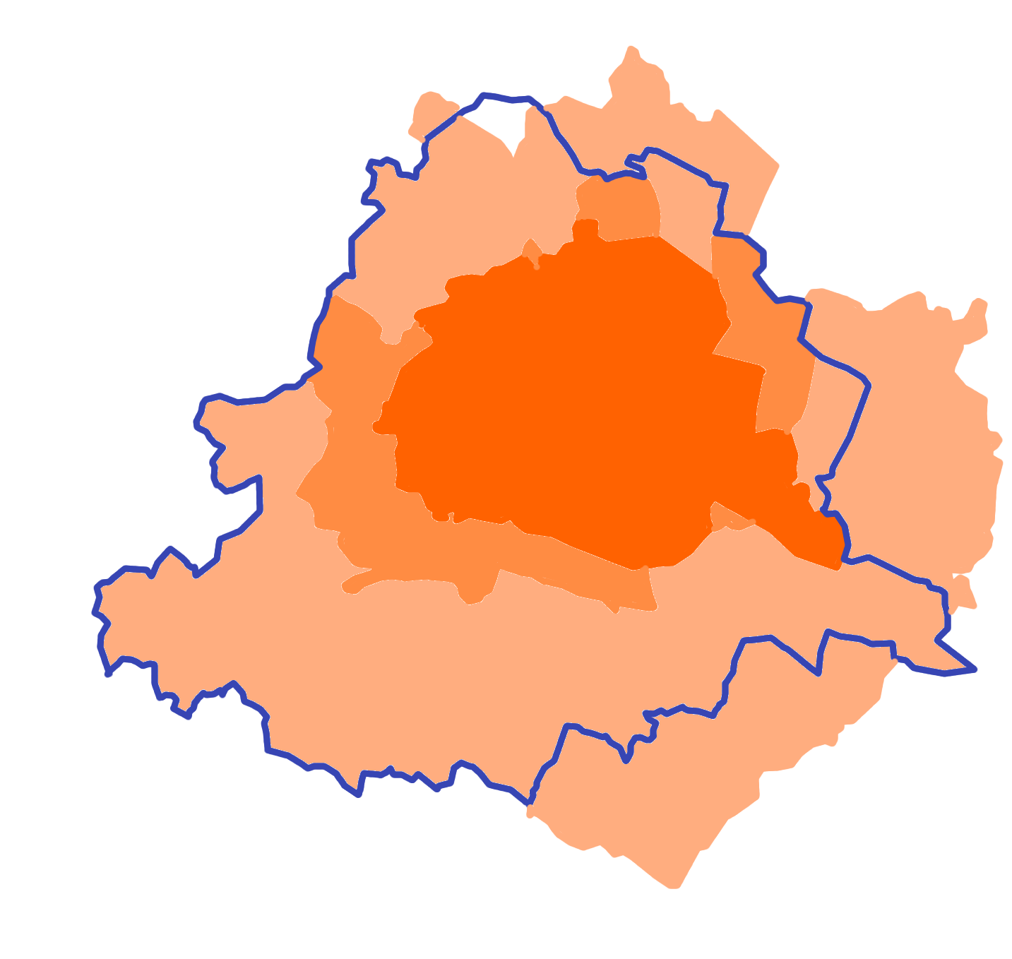 Grenzvorschlag Enquete für den Wiederaufbau Wiens, 1946 selbst gezeichnet (GIMP 2)